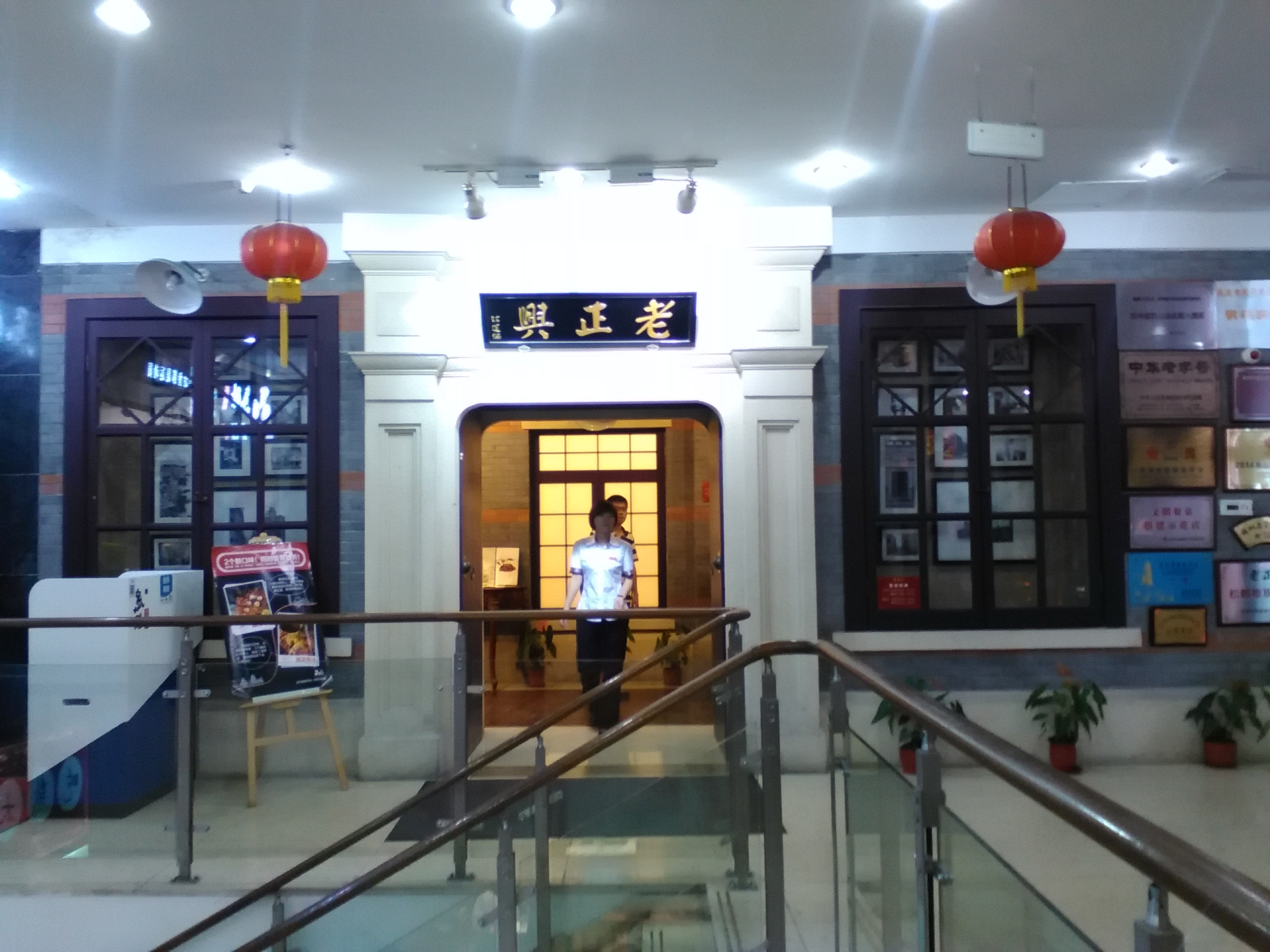 中文（中国大陆）: 苏州老正兴菜馆（重新装修）